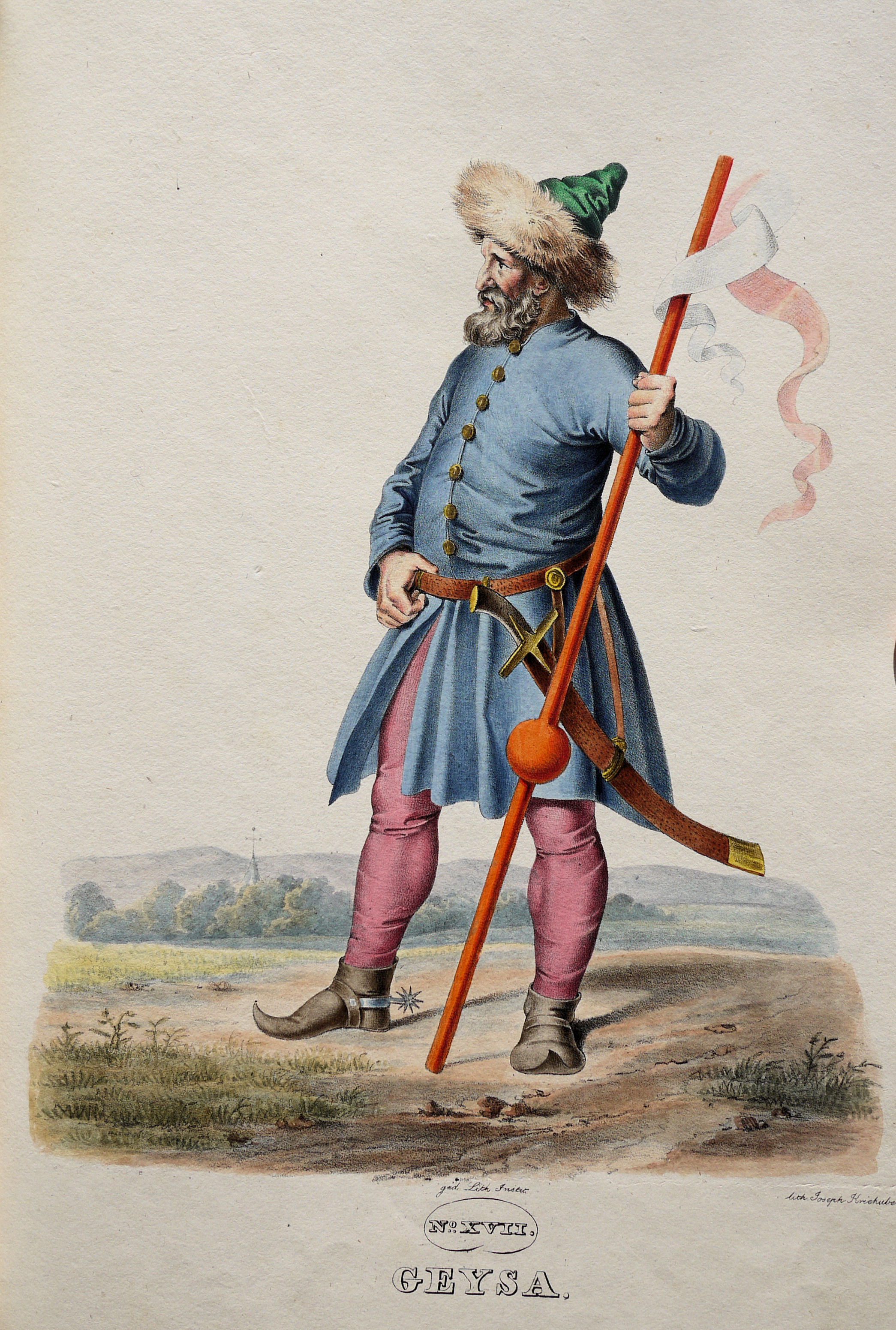 Géza (940-997), Großfürst von Ungarn aus dem Geschlecht der Arpaden. Lithographie von Josef Kriehuber nach einer Zeichnung von Moritz von Schwind aus Ungerns Erste Heerführer Herzoge und Koenige In einer Reihe von Bildnissen von Bela bis auf Seine Majestät Franz I. Kaiser Von Österreich König Von Ungern &c., &c. Wien : Lithographisches Institut ;ca. 1828